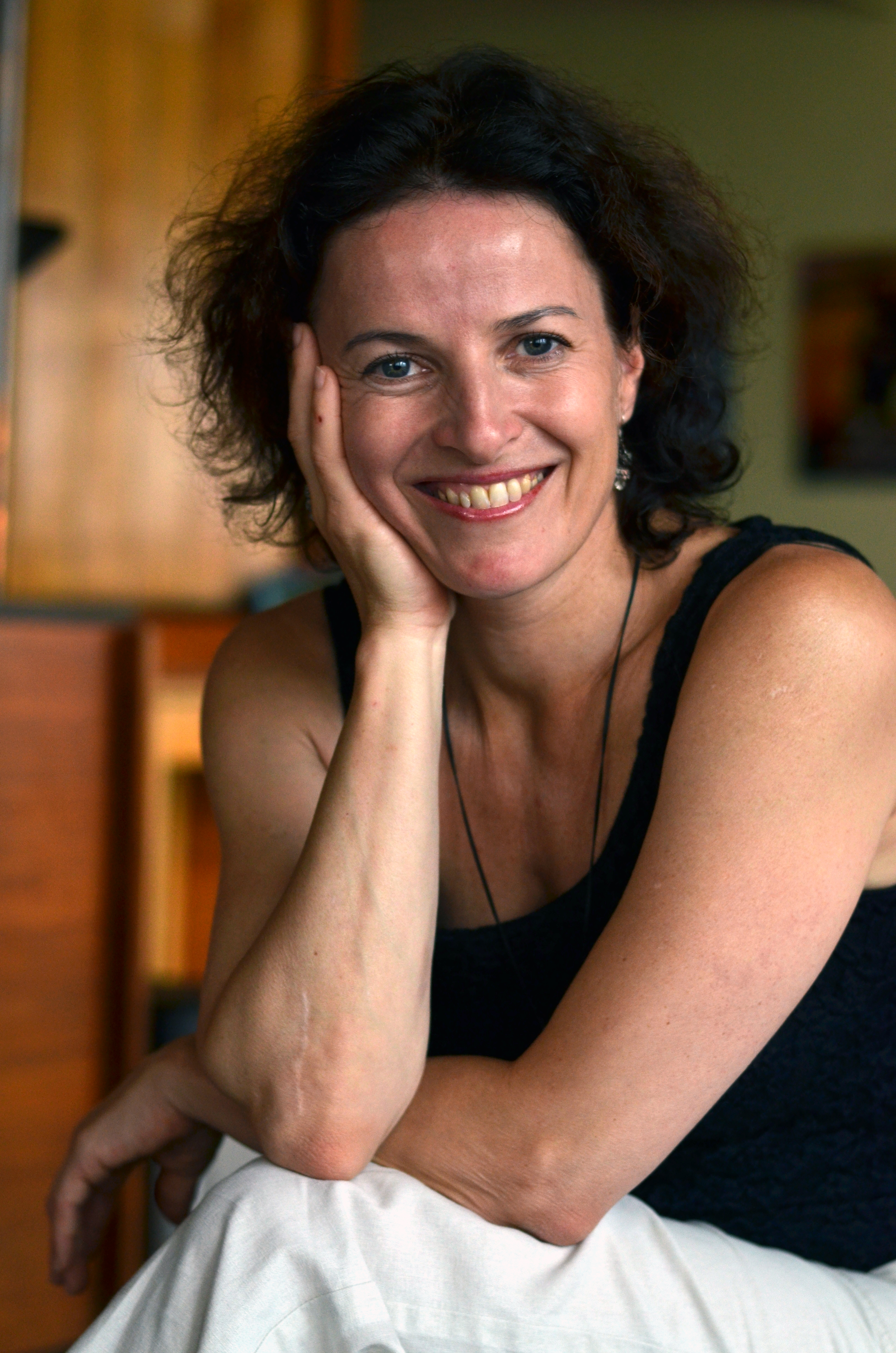 Petra Jungmanová